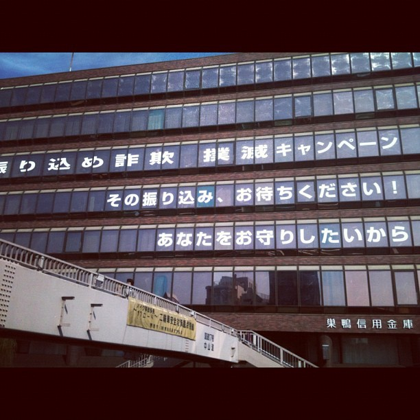 振り込め詐欺 撲滅キャンペーン [1] 巣鴨信用金庫